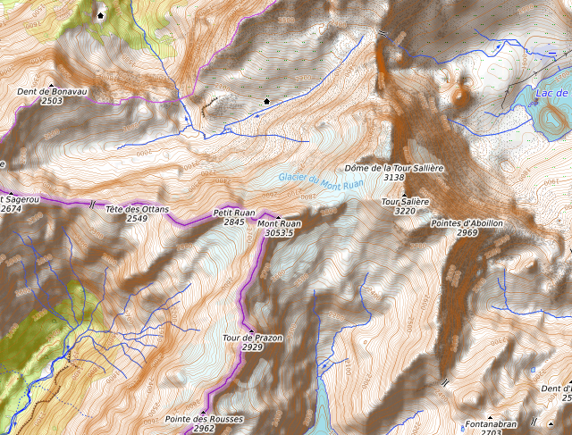 carte réalisée sur umap This map may be incomplete, and may contain errors. Don't rely solely on it for navigation.